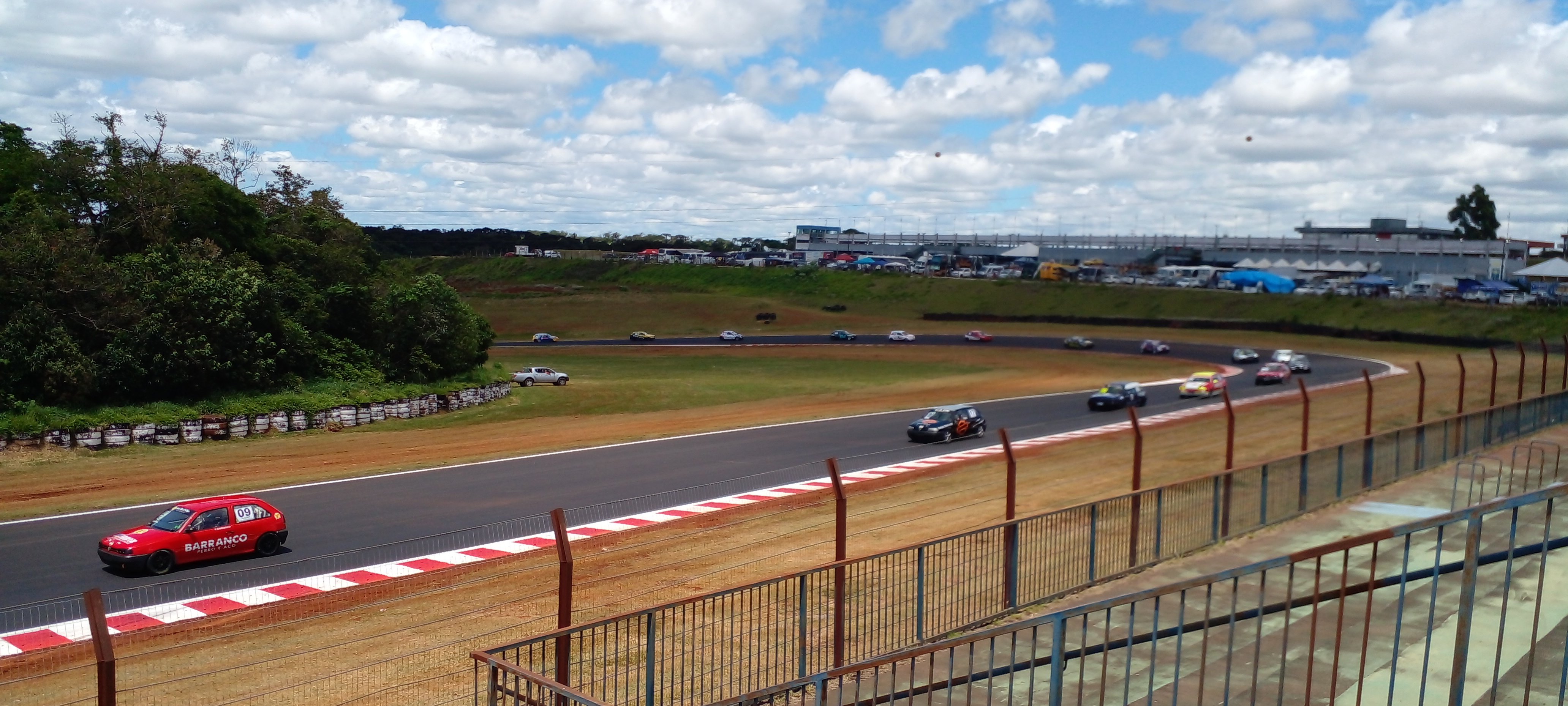 17/07/2016- Cascavel- PR, Brasil- Um prova 2 da Stock Car em Cascavel. Fábio Davini/ Vicar